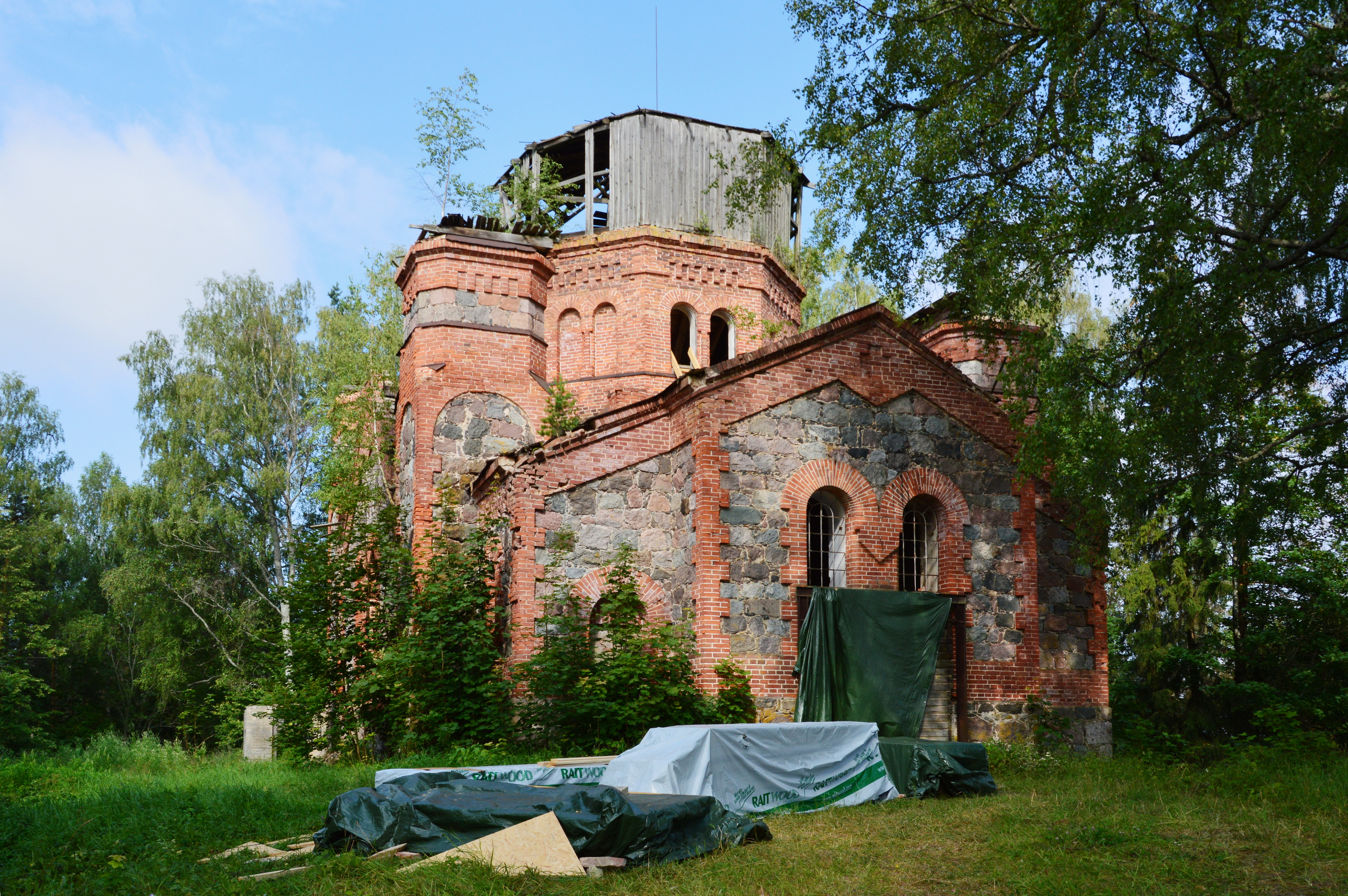 Kastolatsi õigeusu kirik